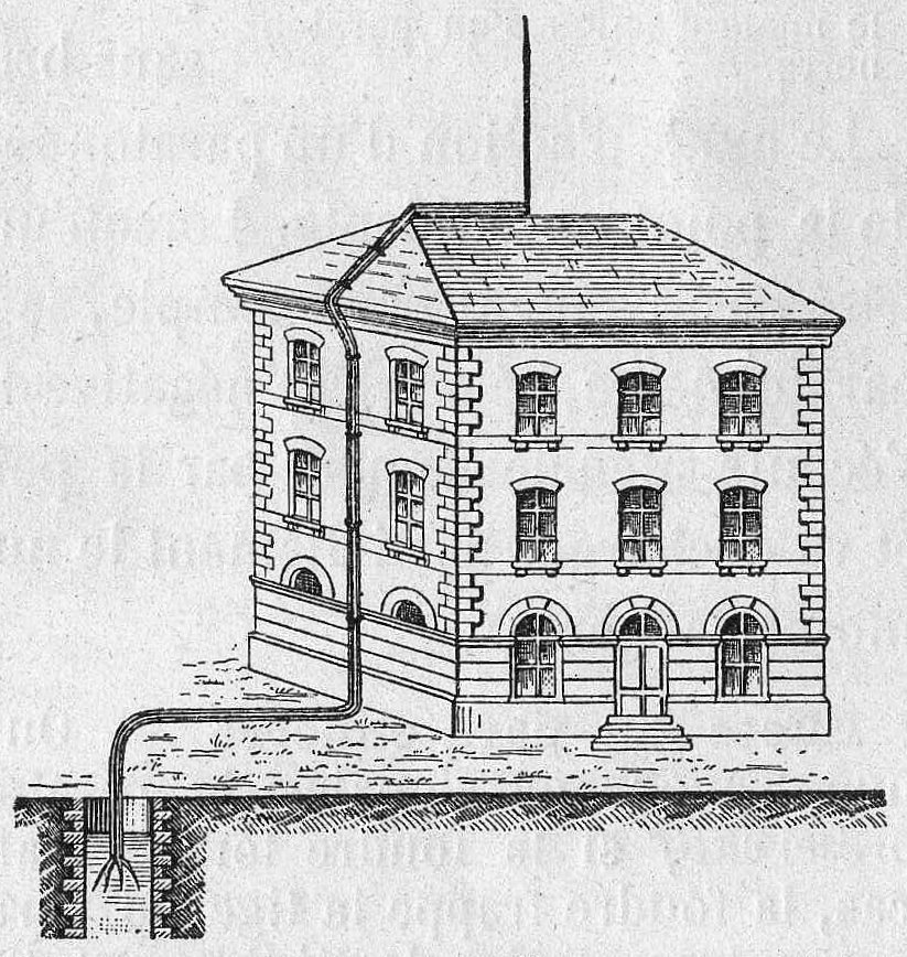 Illustration d'un paratonnerre de Franklin